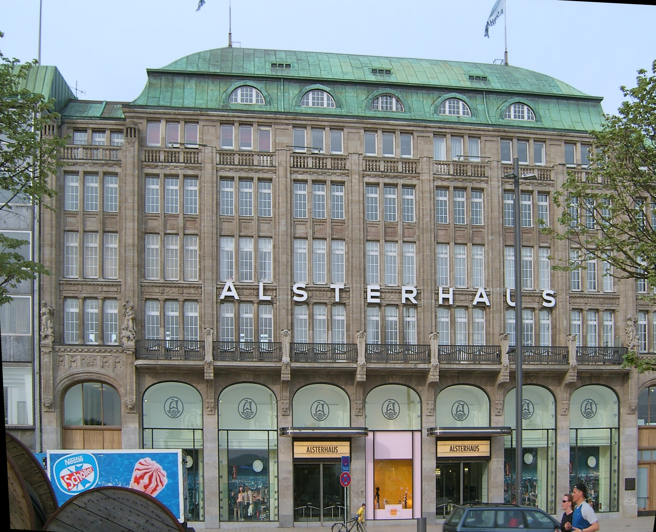 Das Alsterhaus am Jungfernstieg in der Hamburger Innenstadt.